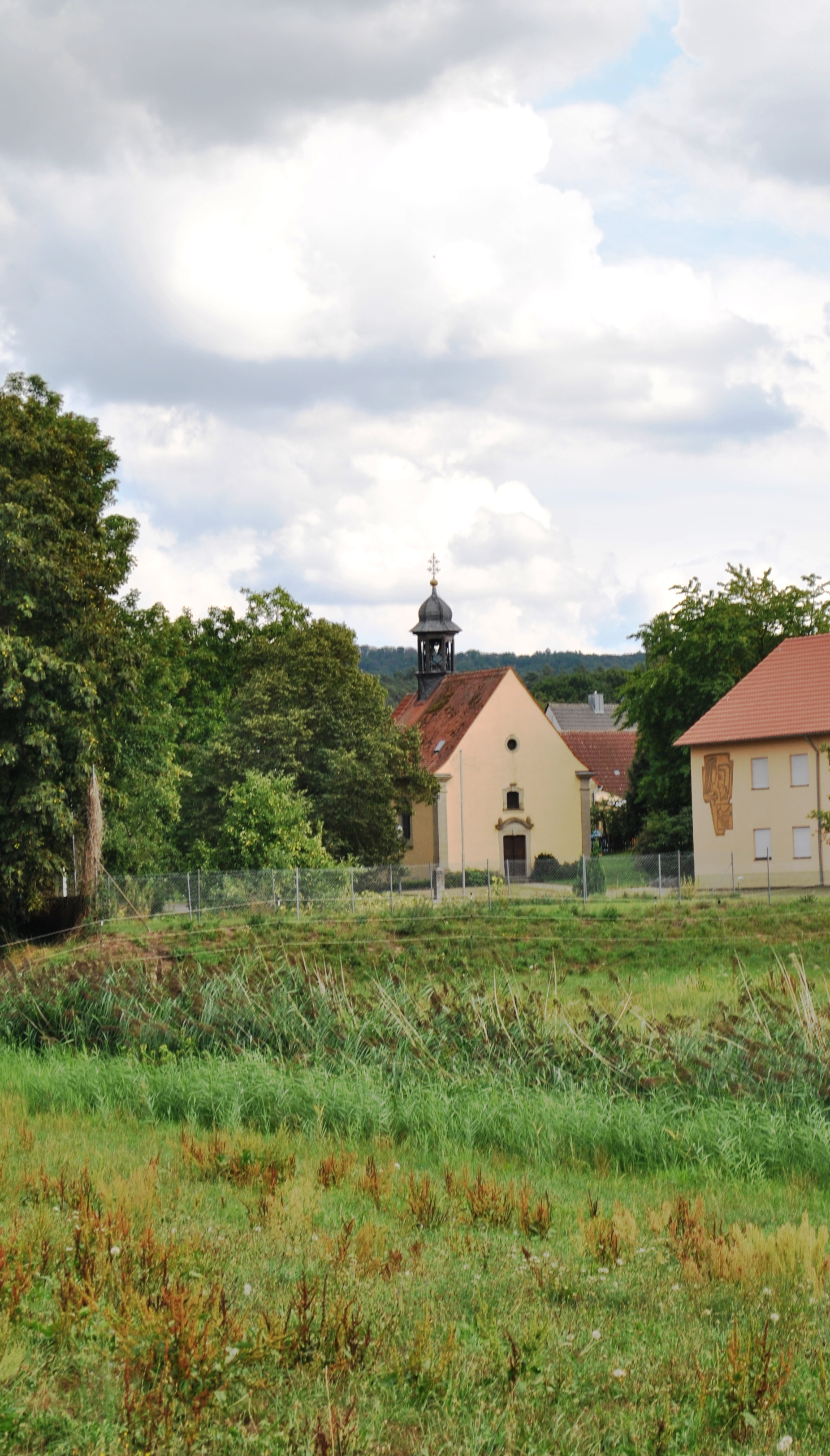 Katholische Filialkirche St. Barbara kleiner Saalbau mit polygonalem Chorabschluss und Dachreiter, bezeichnet 1771; mit Ausstattung; östlicher Anbau, 1954This is a photograph of an architectural monument.